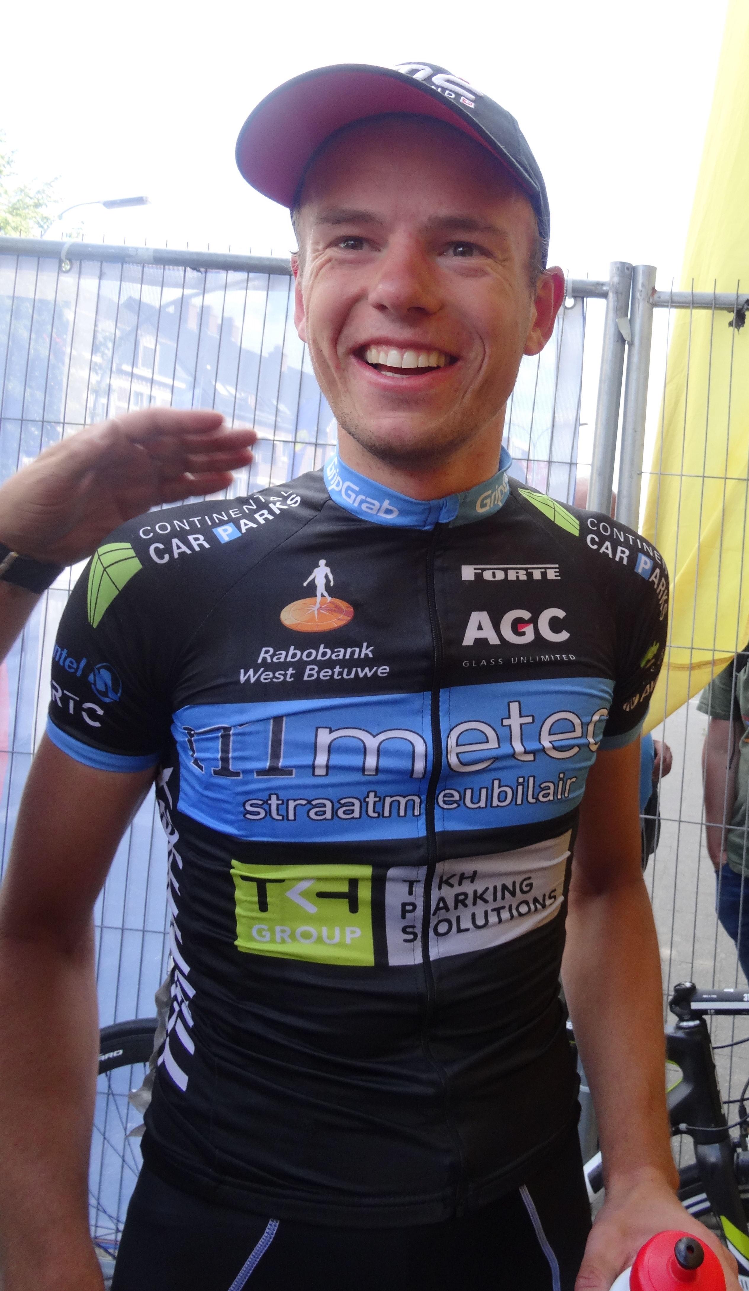 Reportage photographique réalisé le dimanche 15 juin à l'occasion du départ et de l'arrivée du Tour du Limbourg 2014 à Tongres, Belgique.